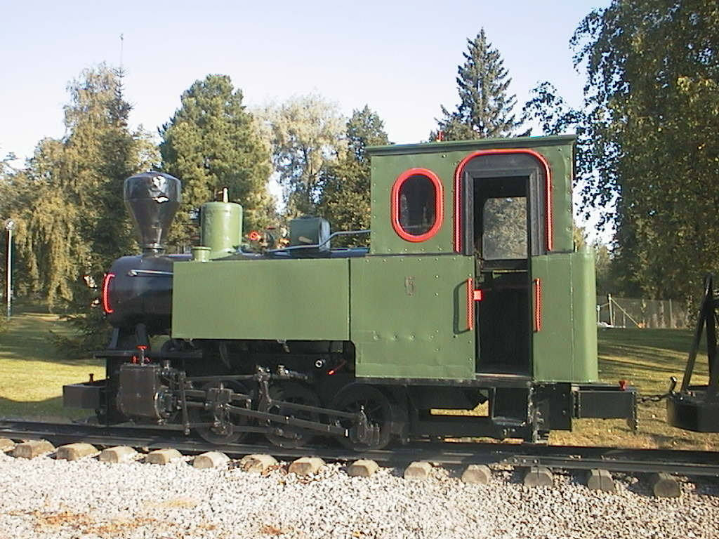 Äänekoski-Suolahden rautatien viitosveturi muistomerkkinä.